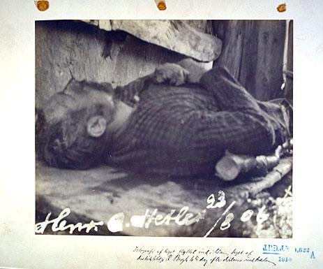 inquest of Henrik Hetle (1906)